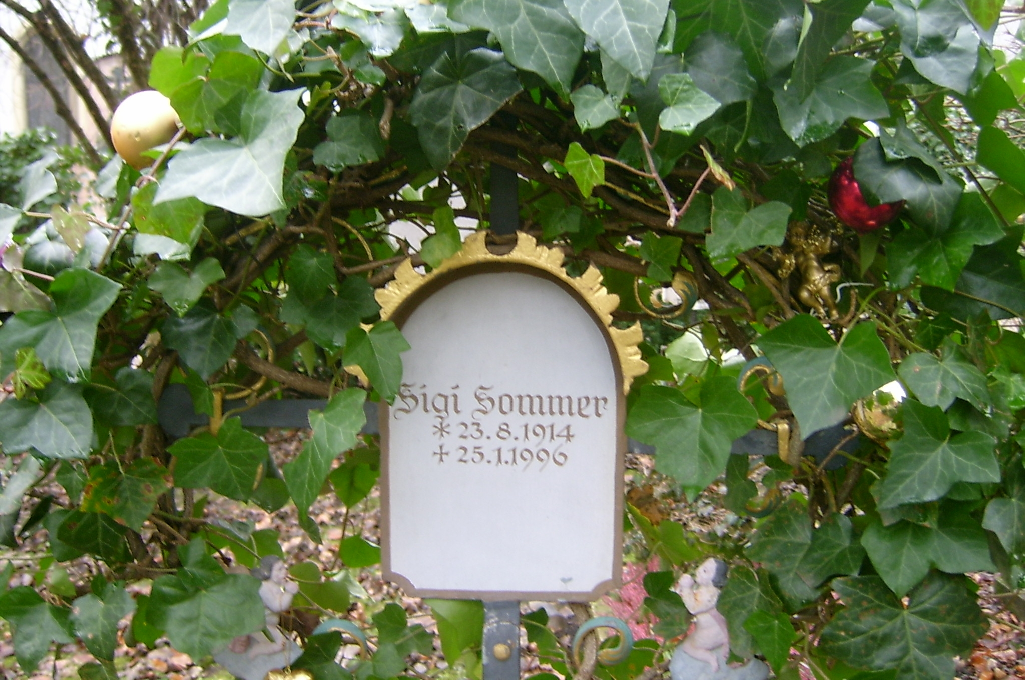 Grabkreuz des Münchner Journalisten und Schriftstellers Sigi Sommer auf dem Winthirfriedhof in München